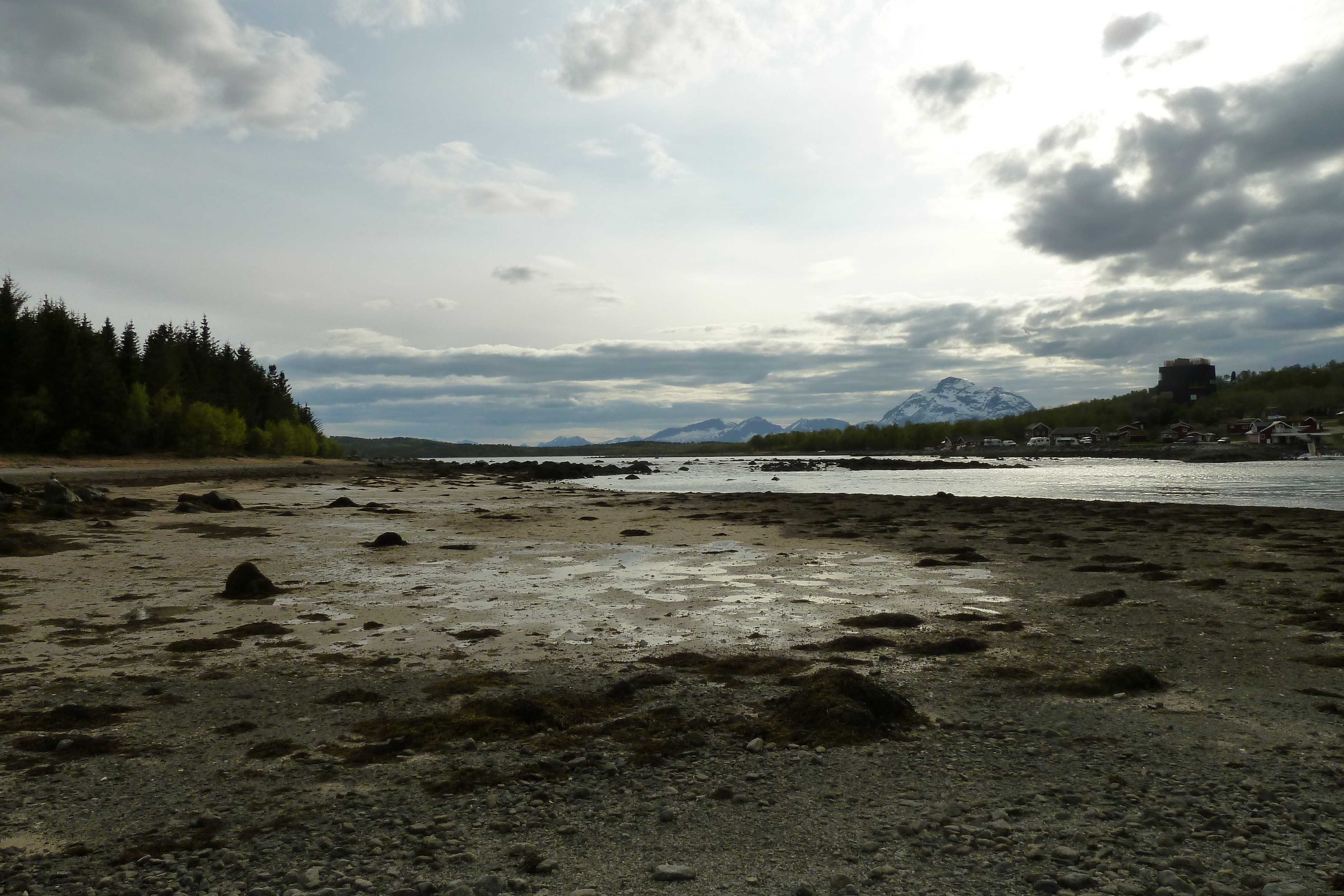 Presteidstraumen sett fra Presteidbrua mot Glimma.